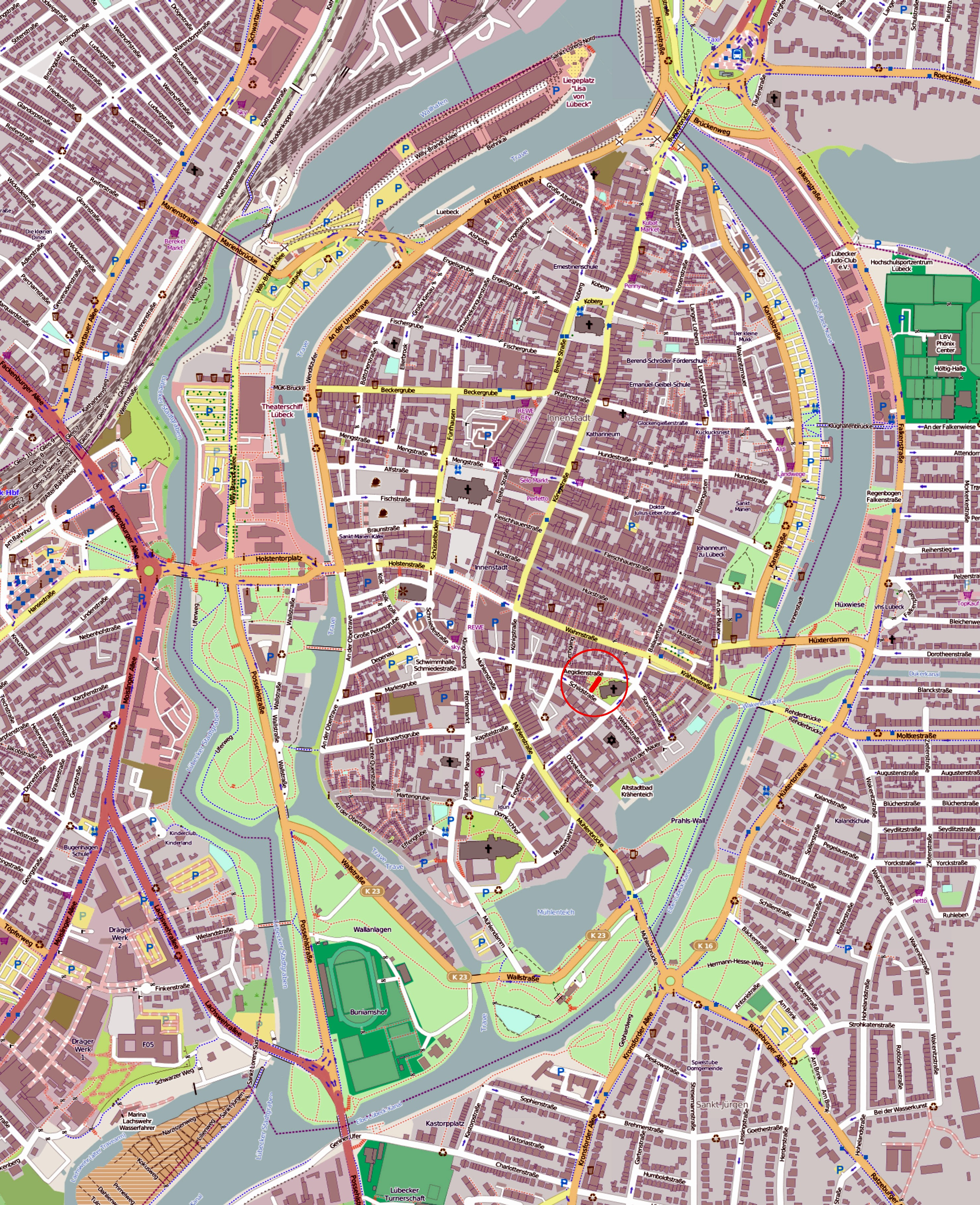 Der Aegidienkirchhof in Lübeck, rot markiert auf einer OpenStreetMap-Karte